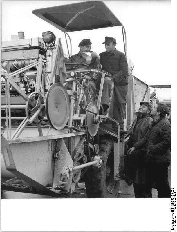 Mähdrescherbesatzung der MTS Weichensdorf Zentralbild Martin 1.9.1960 Nach sozialistischer Hilfe auch bereit, westdeutschen Bauern zu helfen Mähdrescherbesatzungen der MTS Weichensdorf, Kreis Beeskow, auf der Autobahn von Kreis Angermünde nach Hause: "Vor 14 Tagen hatten wir unsere Getreideernte im MTS-Berich Weichensdorf abgeschlossen. Seit dieser Zeit helfen wir in der LPG Grünow im Kreis Angermünde, das Getreide bergen. Jetzt haben wir alles unter Dach und Fach und fahren zurück nach Hause. Unsere Maschinen könnten aber noch gut genutzt werden, um zu verhindern, dass den Bauern in Westdeutschland das Getreide auf dem Feld verdirbt. Obwohl wir anstrengende Tage hinter uns haben, würden wir sofort ohne Pause hinüberfahren. Übrigens betrachten wir das auch als einen Schritt zum weiteren gegenseitigen Verständnis der Landbevölkerung ganz Deutschlands und zur Einheit eines demokratischen Deutschlands: UBz: Die Mähdrescherbesatzung vlnr Adolf Haase, Mädrescherfahrer, Erwin Schmidt, Mähdrescherfahrer, Herbert Pissner, Traktorist, Herbert Woffke, Mähdrescherfahrer